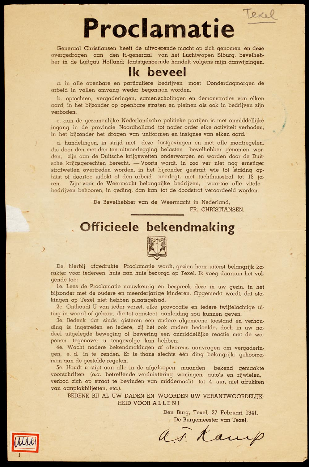 Proclamatie van Gen. Christiansen, betr. het overnemen van de uitvoerende macht in Noord-Holland, n.a.v. de Februari-staking 1941. Dan volgen enige raadgevingen van de burgemeester in een officeele bekendmaking: De hierbij afgedrukte proclamatie wordt